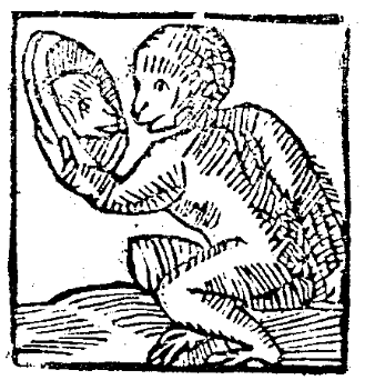 Zeichnung des Brückenaffen von 1620